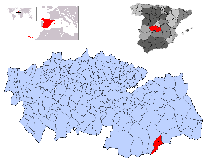 Camuñas en la provincia de Toledo